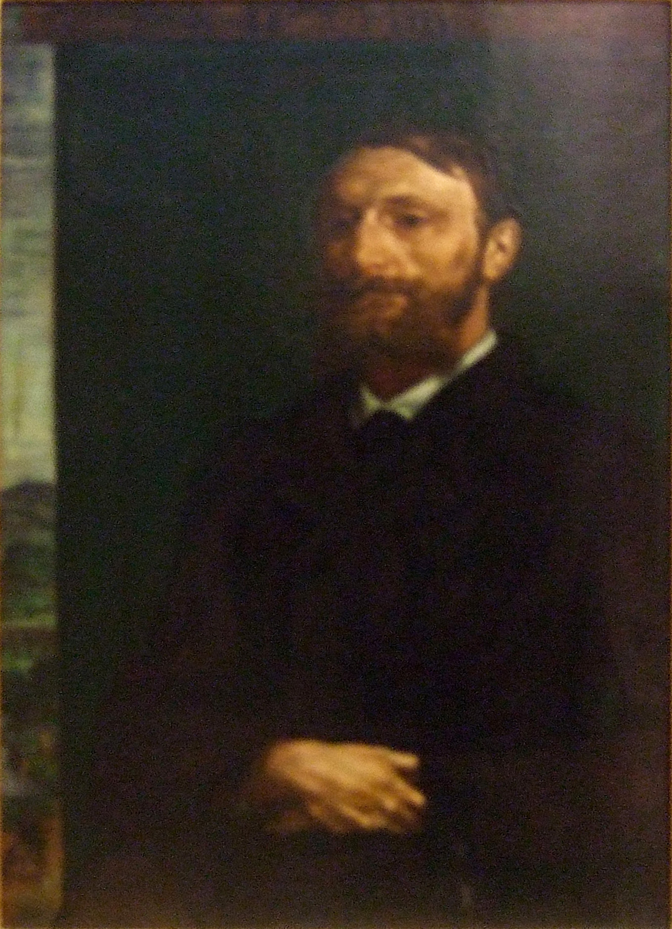 Bildnis Konrad Fiedler. Nach Zeichnungen von einem Besuch Fiedlers und seiners jungen Frau entstand das Bildnis Fiedler, das in Mai 1879 als Geschenk an diesen nach Deutschland ging.